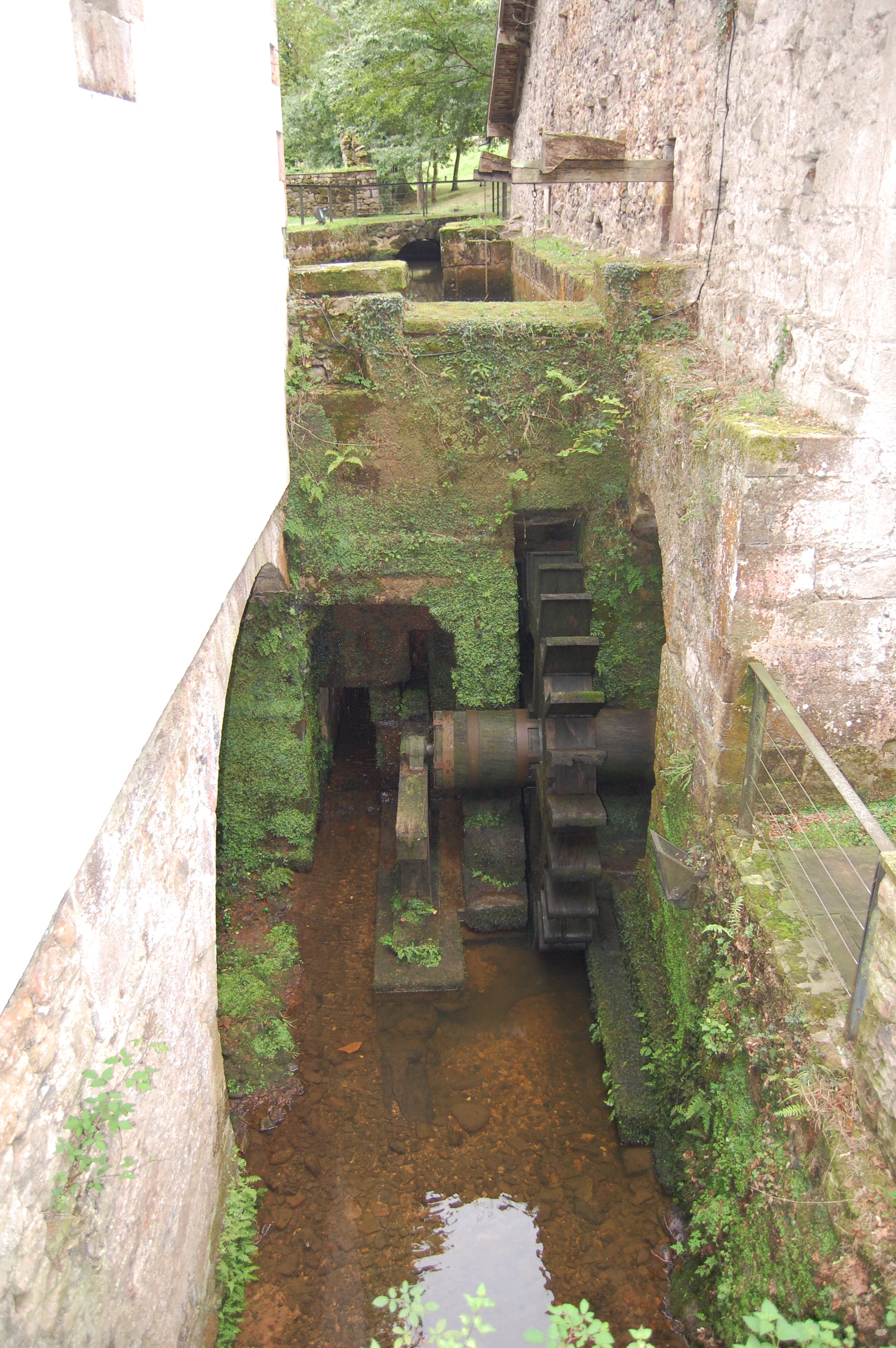 Molino de agua de la antigua ferrería de la localidad de Cades, en el municipio de Herrerías.